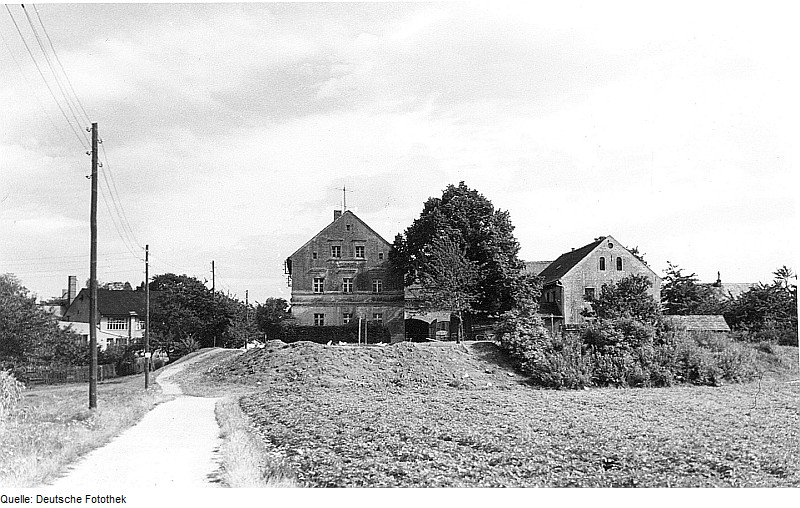 Original image description from the Deutsche Fotothek Görlitz-Rauschwalde. Windmühlenanwesen Seibt (Windmühle um 1780 erbaut, 1904/1907 abgebrochen)